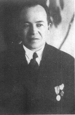 1935年包尔汉荣获金质奖章后摄